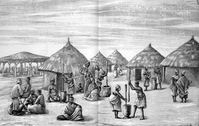 Les pileuses de couscous (mil). "L'horrible danse du pilon" (illustration de Côte occidentale d'Afrique du Colonel Frey, planche en double page après la p. 115)